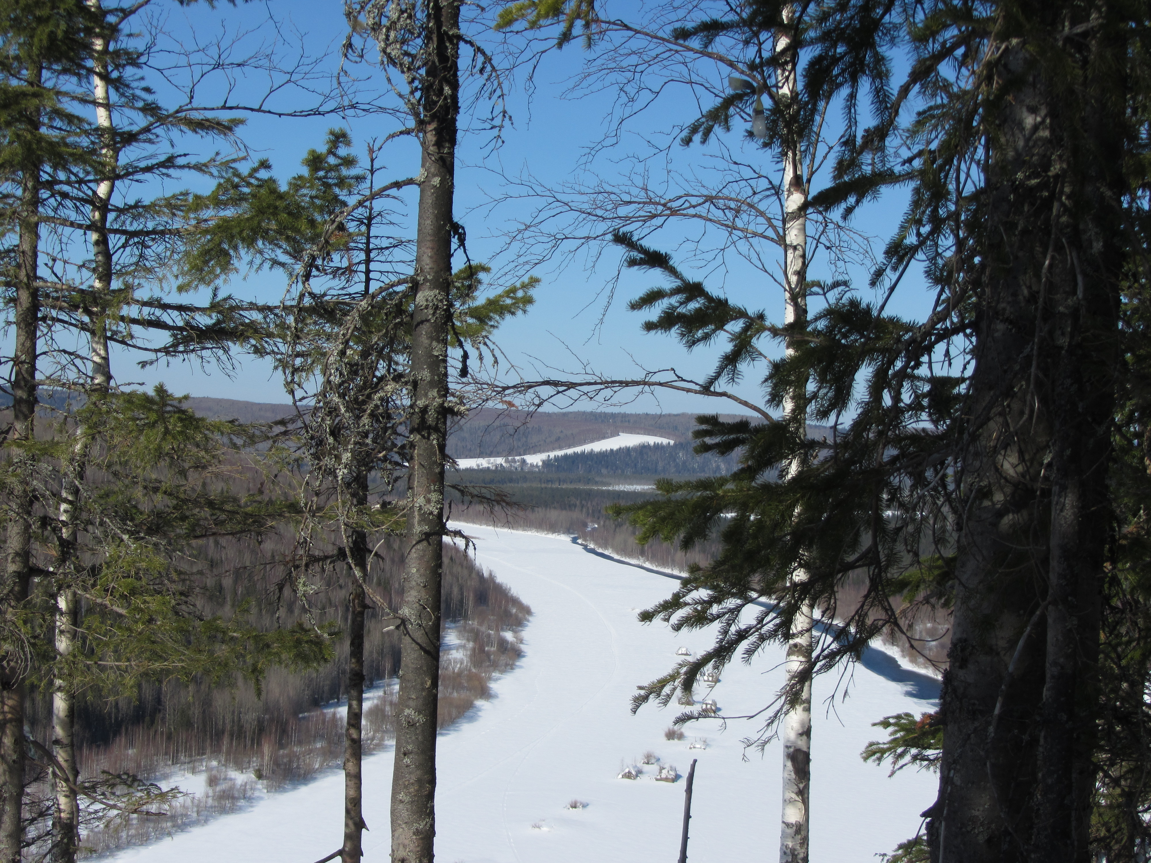 Река Вишера: Красновишерский район, Пермский край This image is related to the protected area of Russia number 5910206